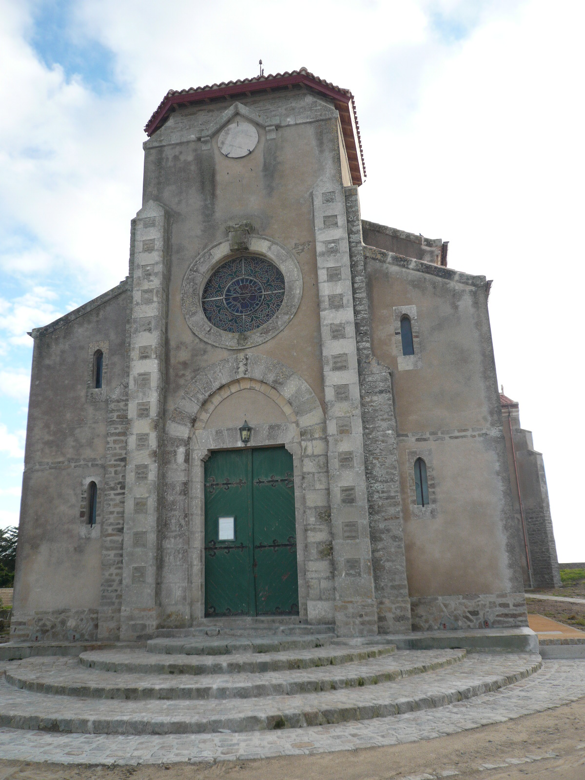 Eglise de l'Herbaudière de face